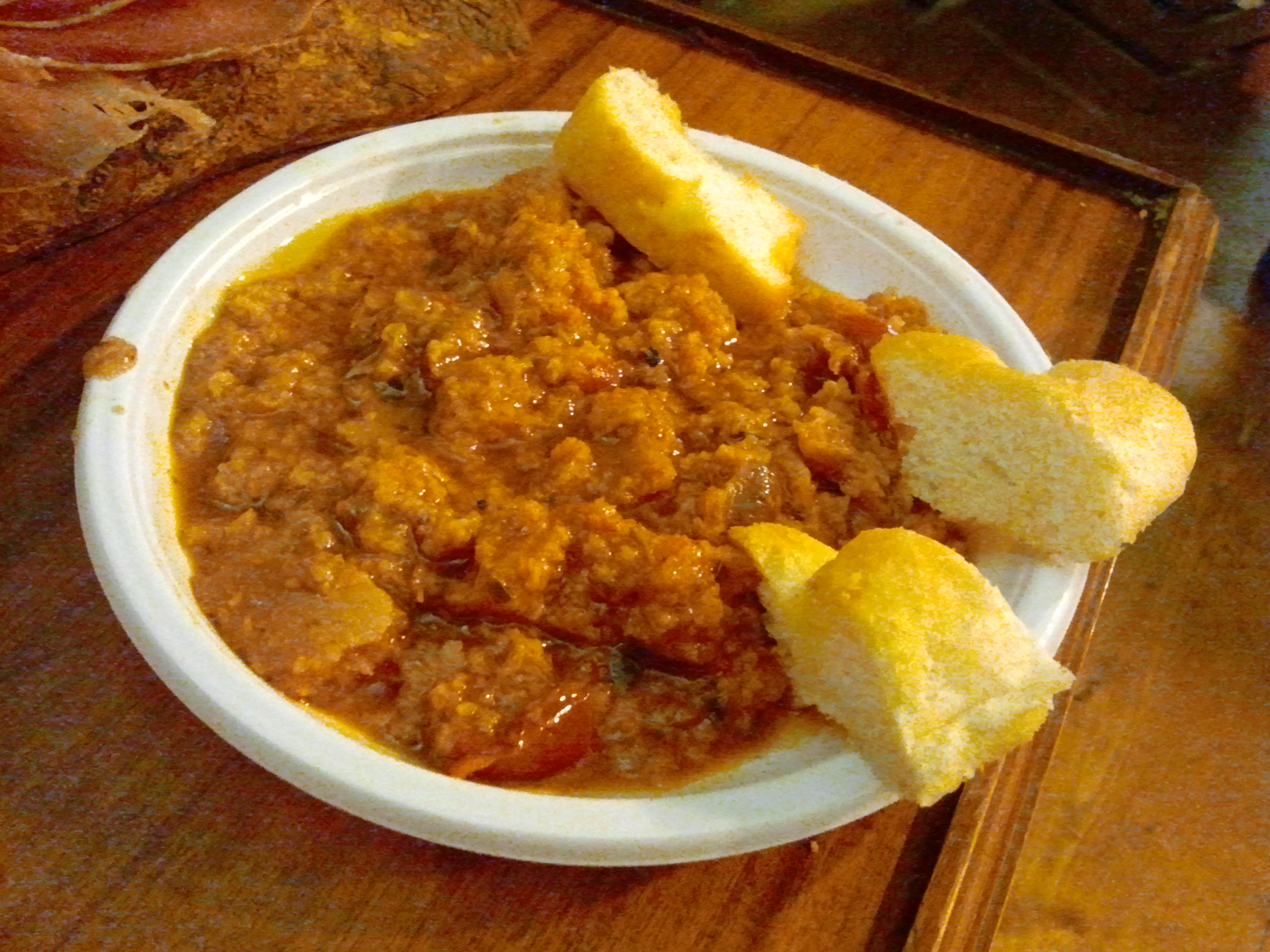 Minestra di pane e pomodoro, rosmarino, olio extravergine di oliva